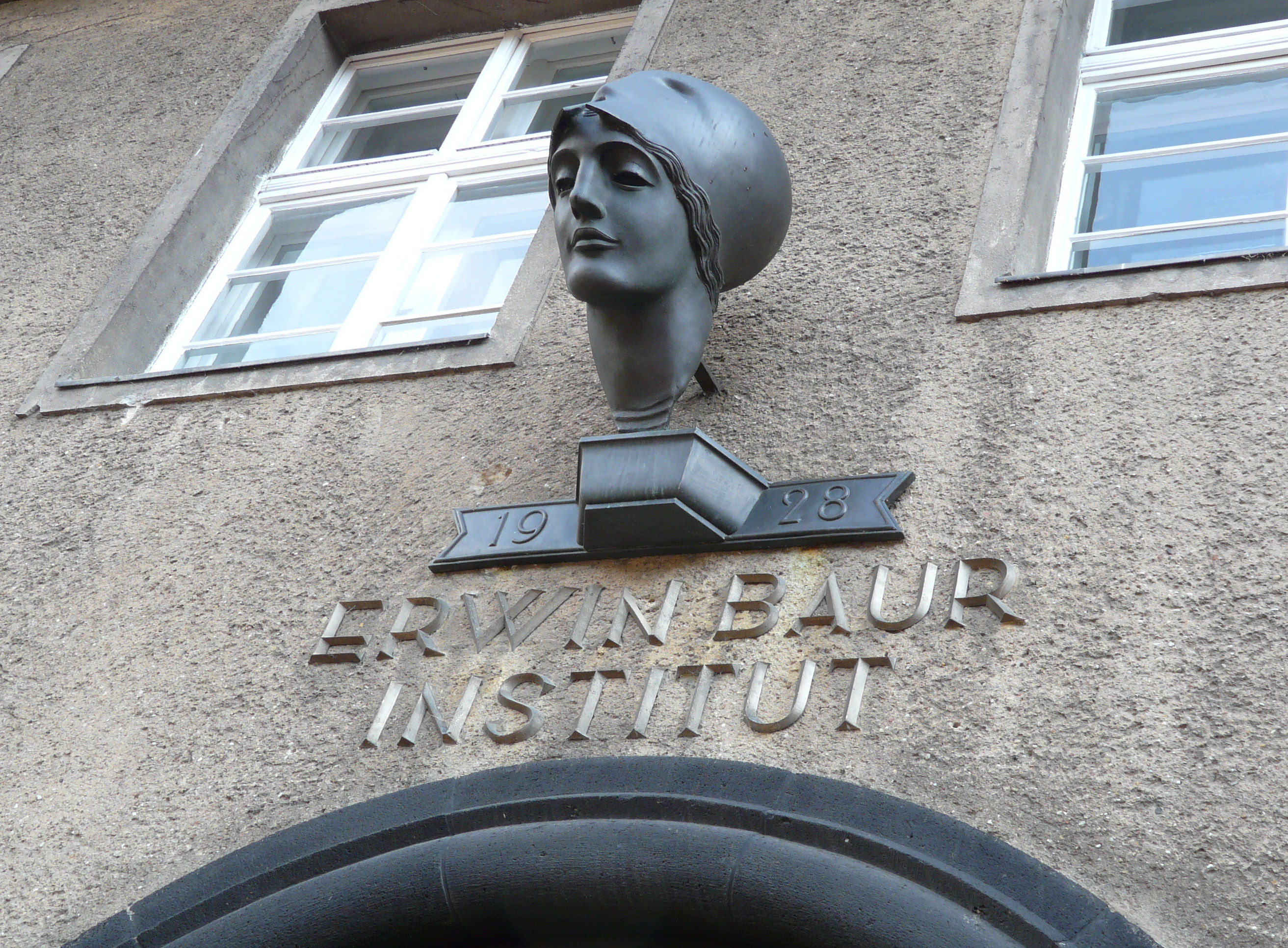 Leibniz-Zentrum für Agrarlandschaftsforschung in Müncheberg (Mark), Wandschmuck am historischen Hauptgebäude